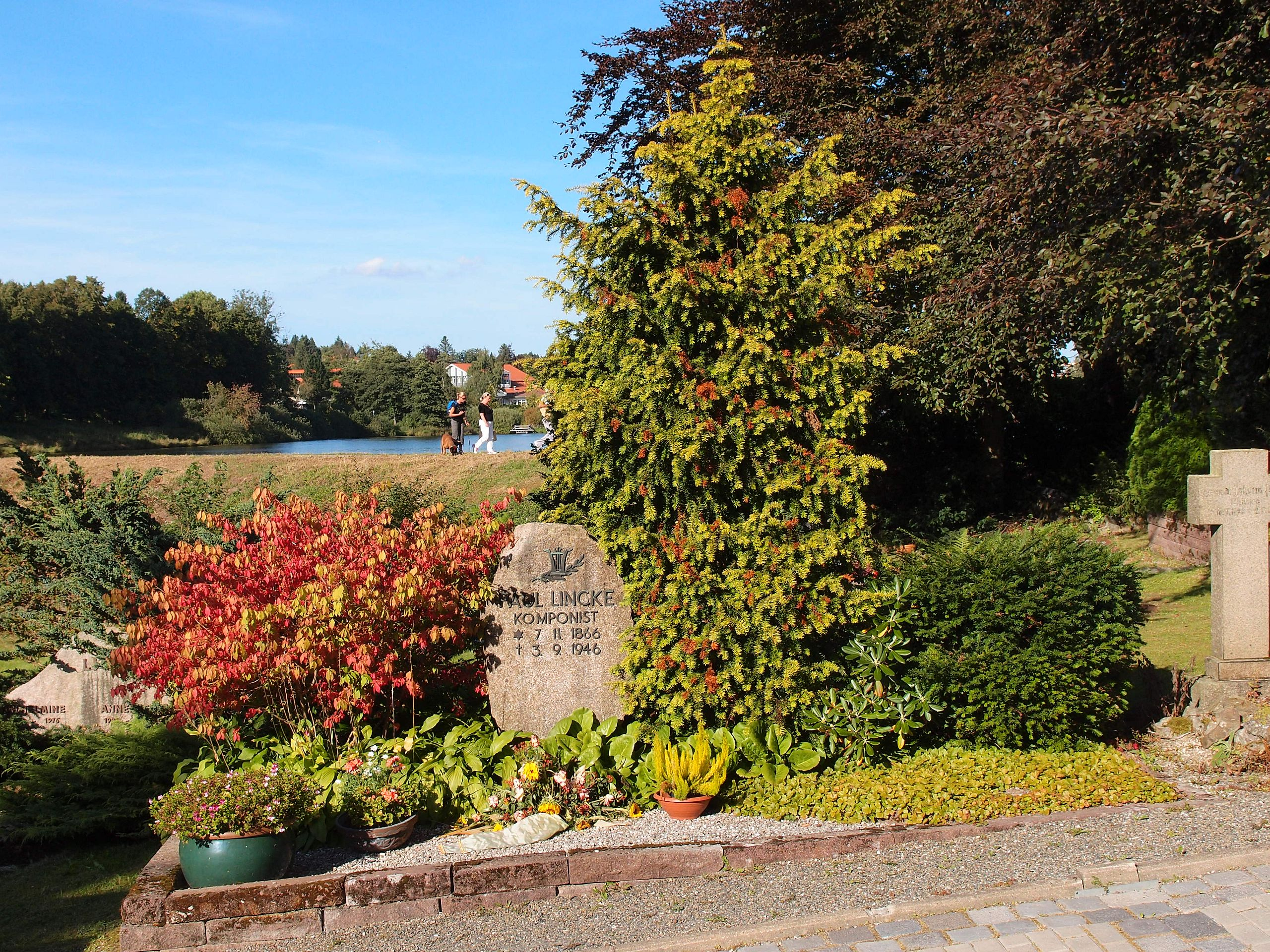 Grab von Paul Lincke auf dem Friedhof von Hahnenklee, im Hintergrund der Große Kranicher Teich